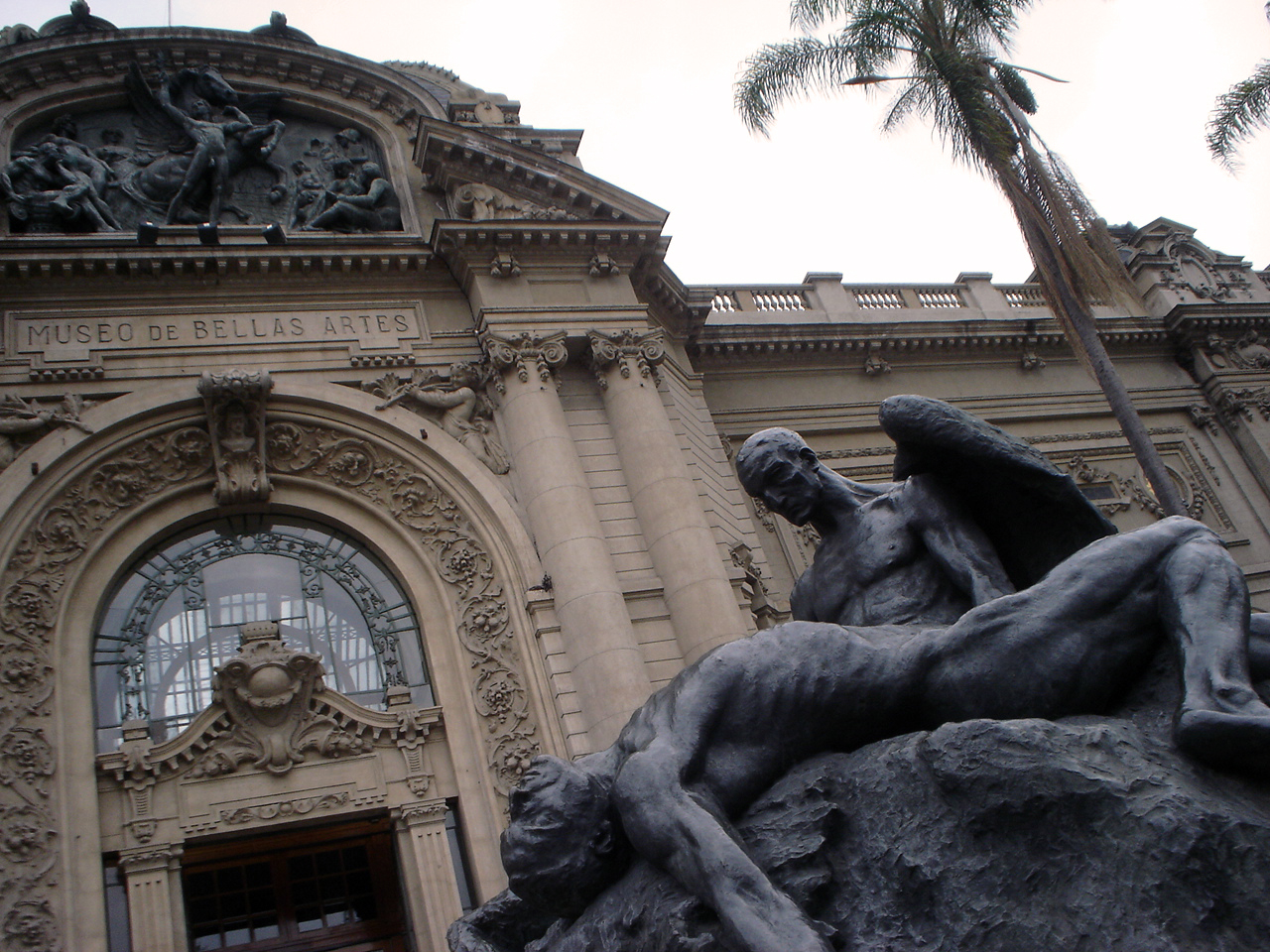 Fachada del Museo Nacional de Bellas Artes en Santiago de ChileBeLLas ArTes